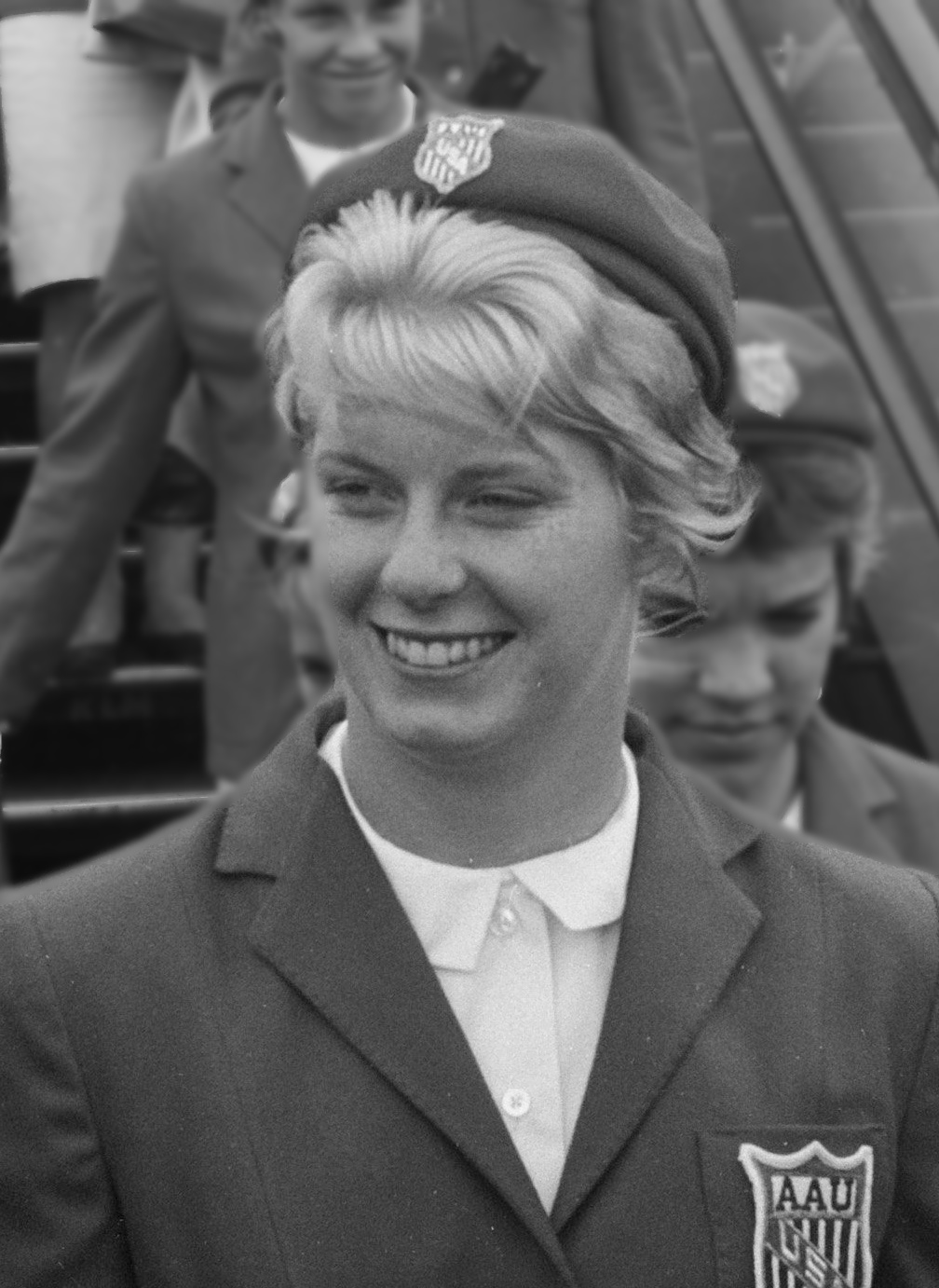 Aankomst Amerikaanse zwemploeg. Chris van Saltza